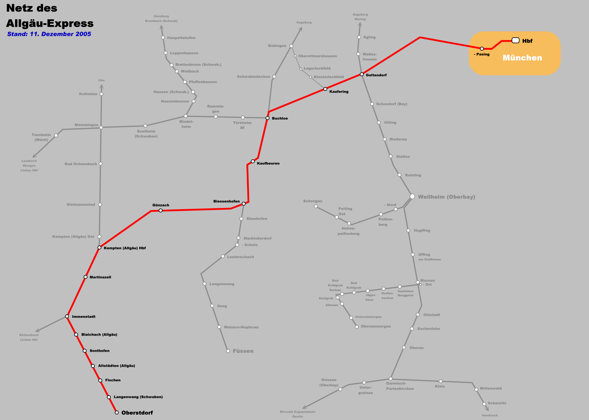 Netz des Allgäu-Express